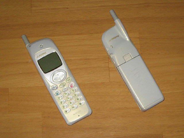 J-PHONE J-DN01 (Composite picture)